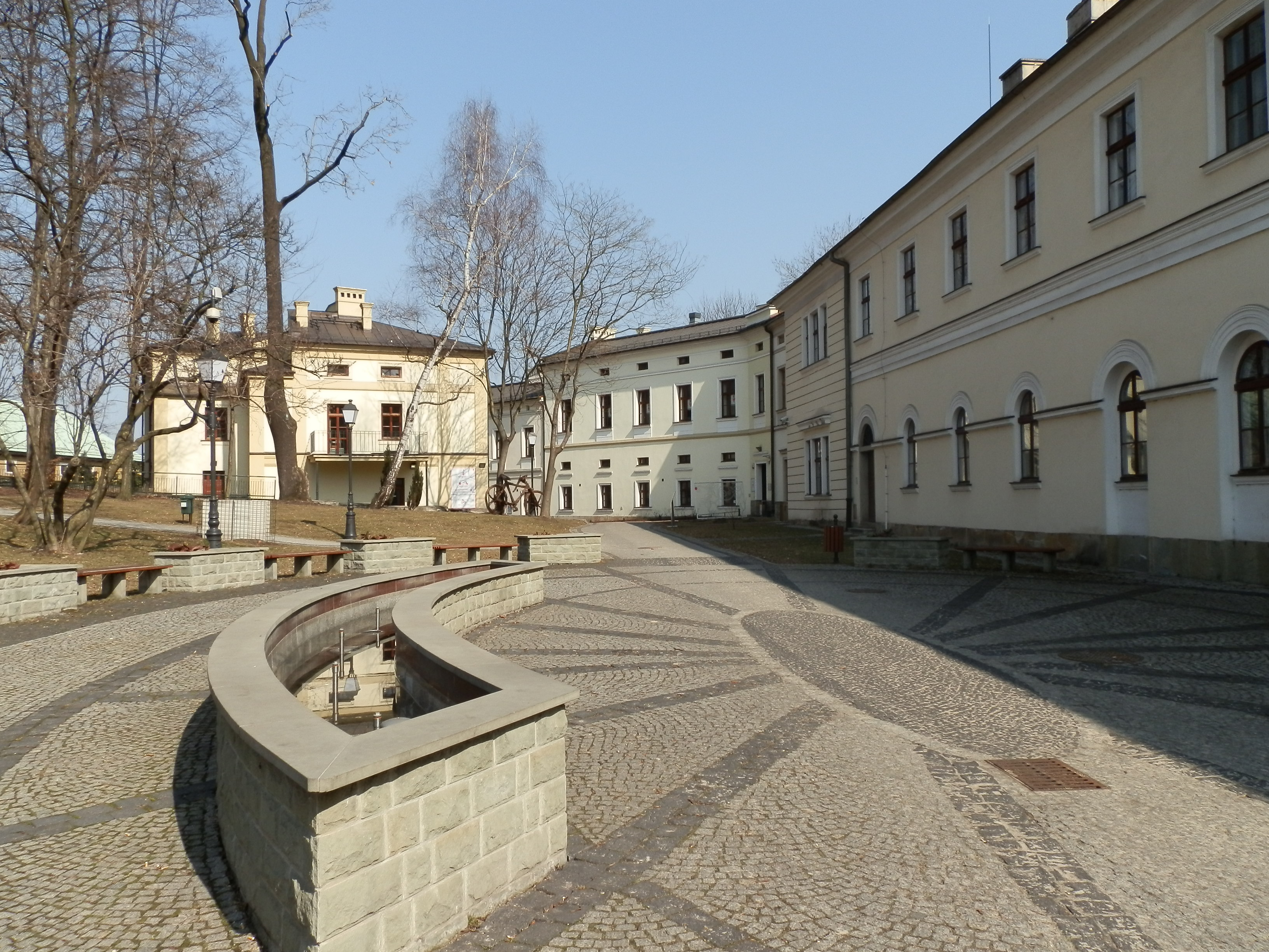 Castle Cieszyn